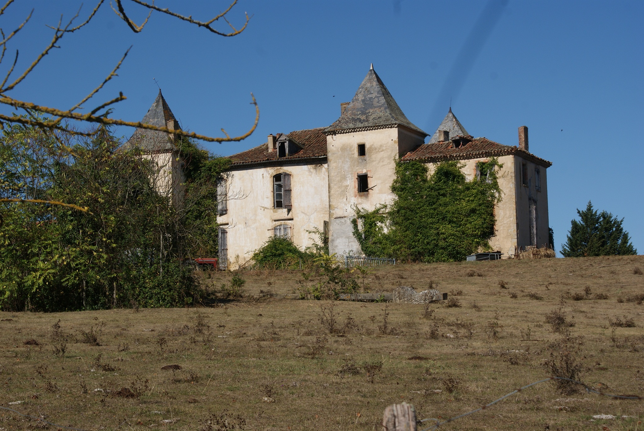 Het kasteel.